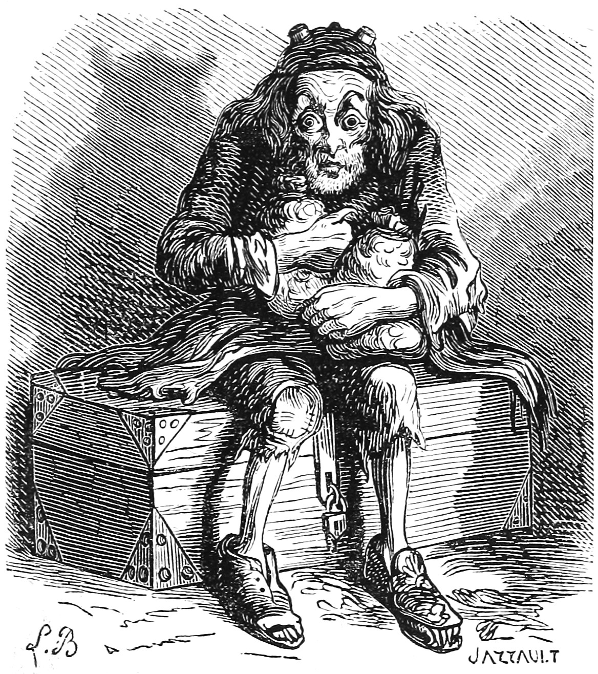 Mammon. Illustration du Dictionnaire infernal de Jacques Auguste Simon Collin de Plancy par Louis Le Breton, 6eme édition, 1863.